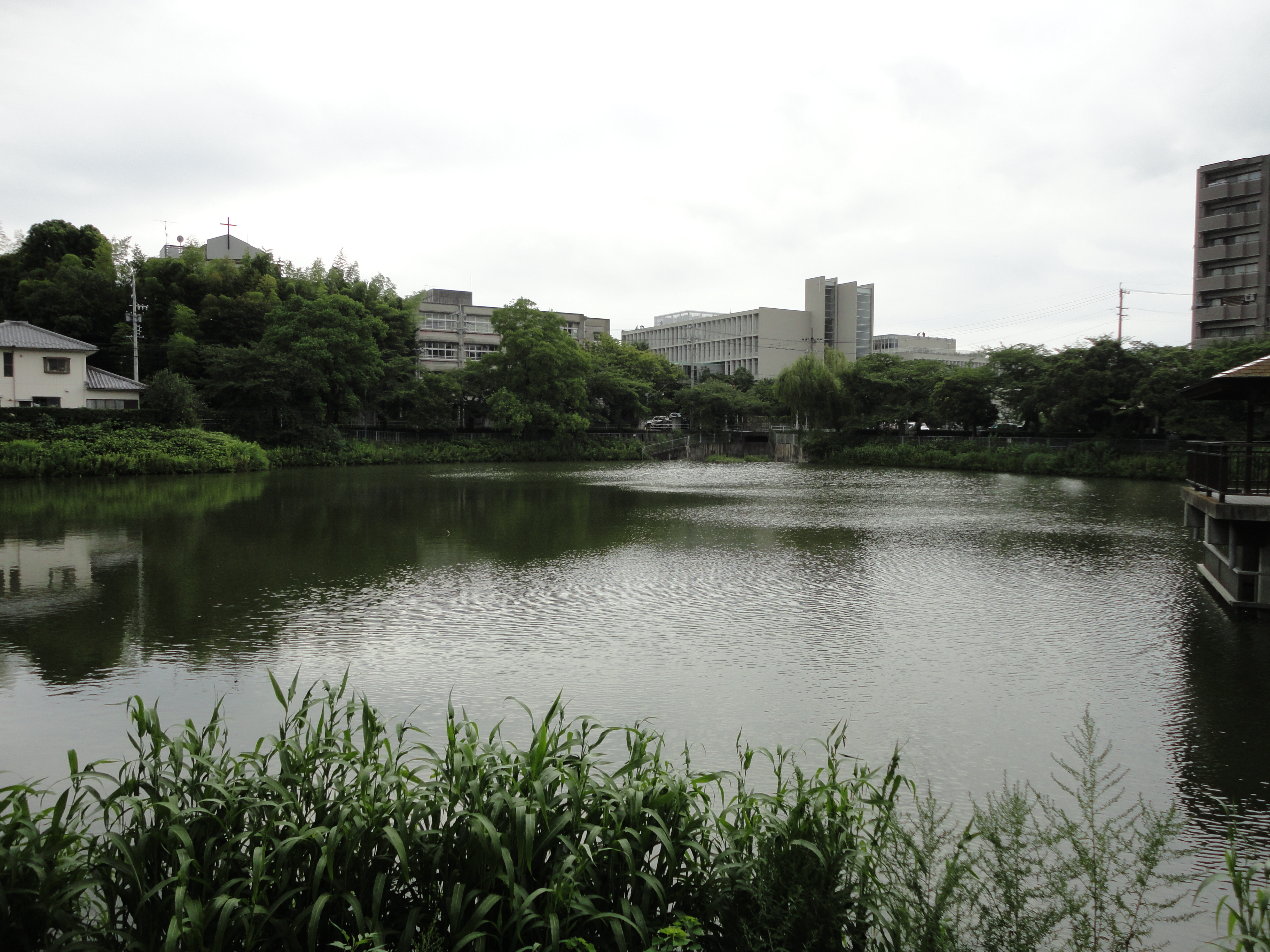 隼人池公園